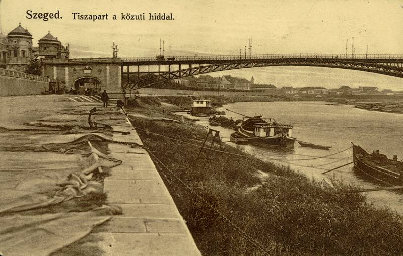 szeged